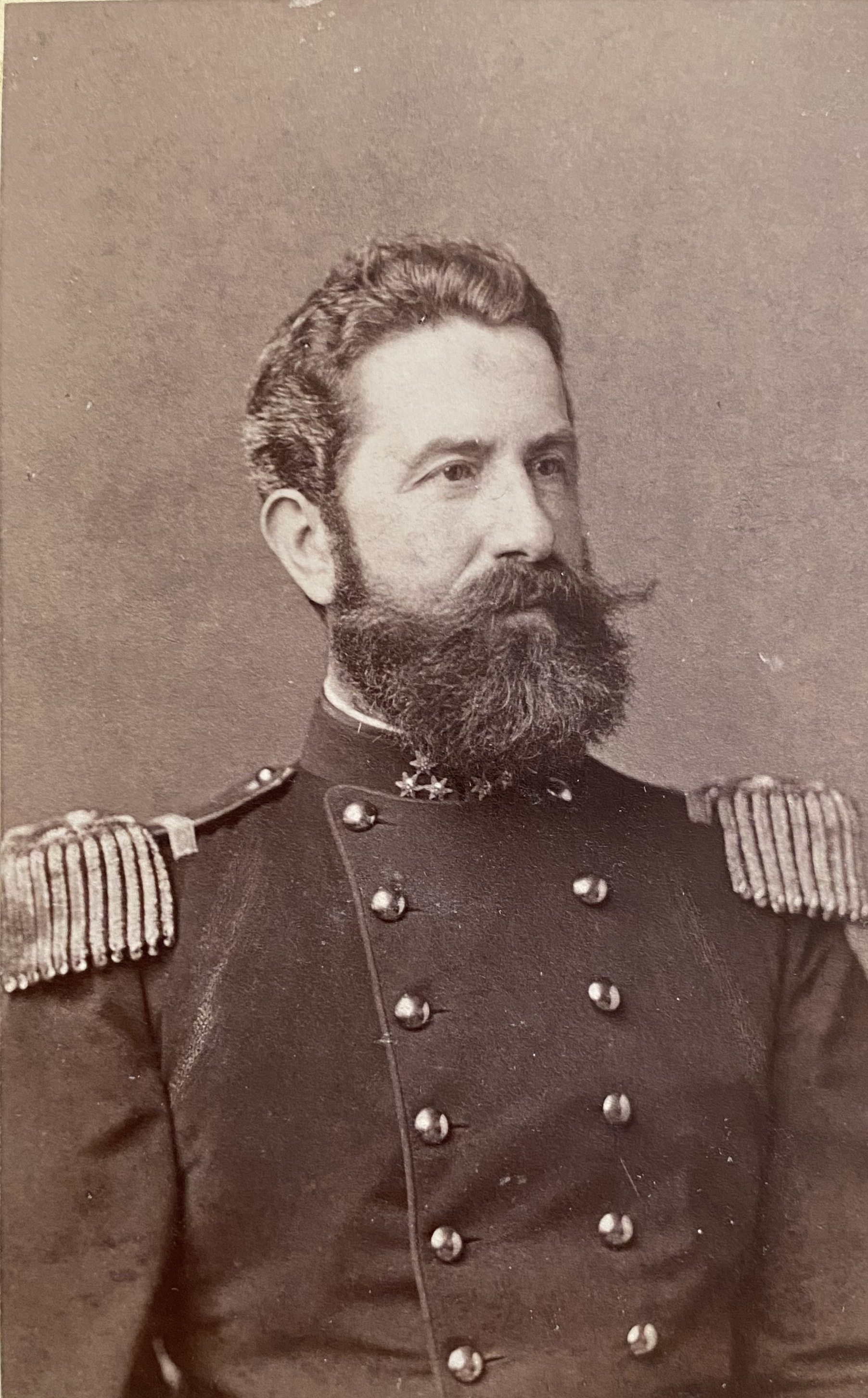 Fotka z druhé poloviny 19. století